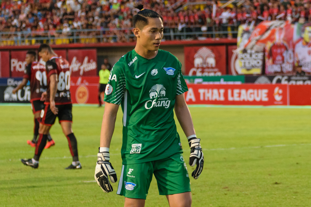 Tanachai Noorach